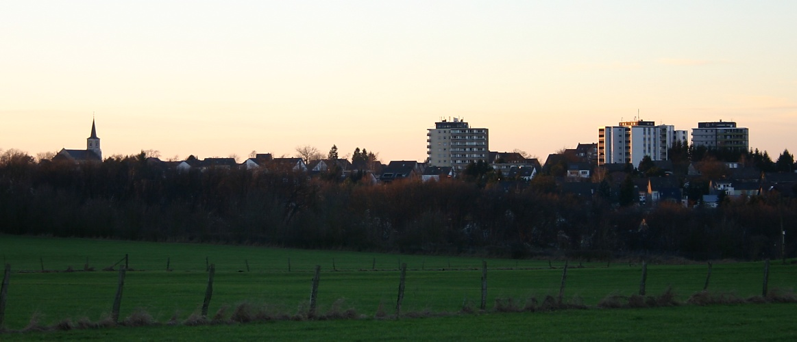 Blick auf Walheim (Aachen)